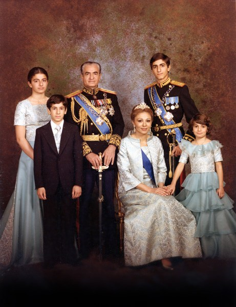 De gauche à droite, Fahranaz, Ali Reza, Mohammed Reza Shah Pahlavi, Farah Pahlavi, Reza, Leila.